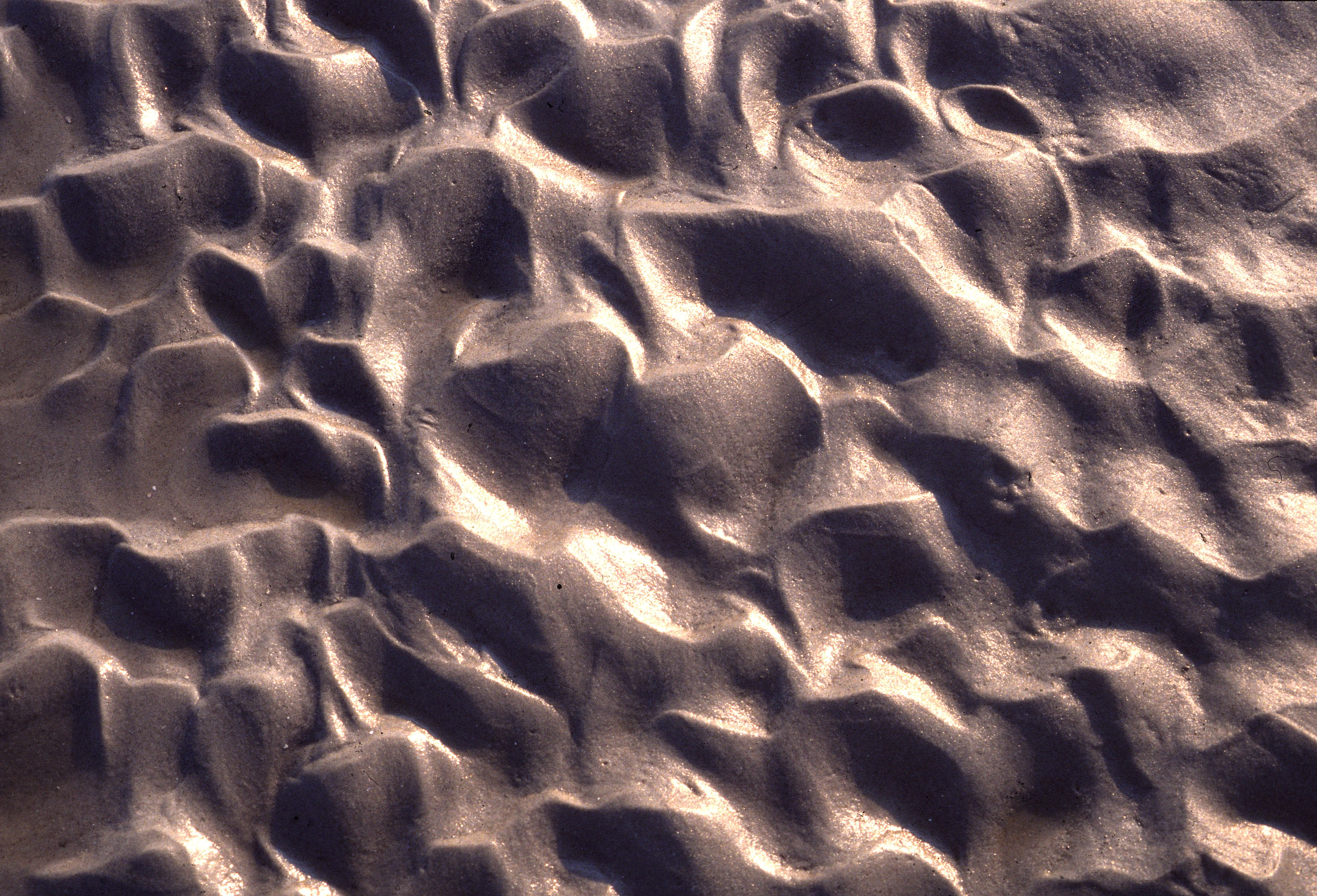 Oszillationsrippel.